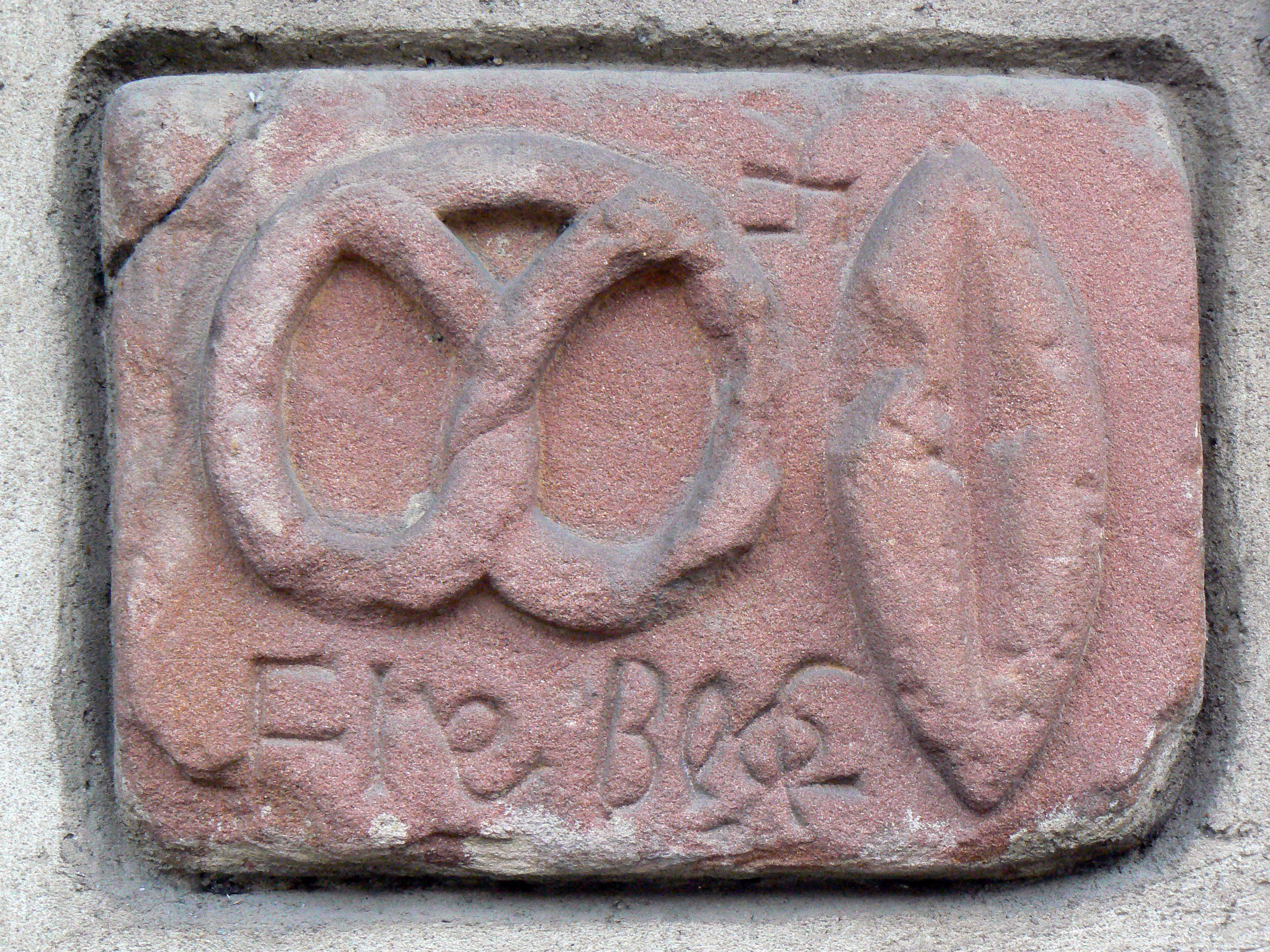 enseigne ancienne de boulanger Pfaffenhoffen Bas Rhin